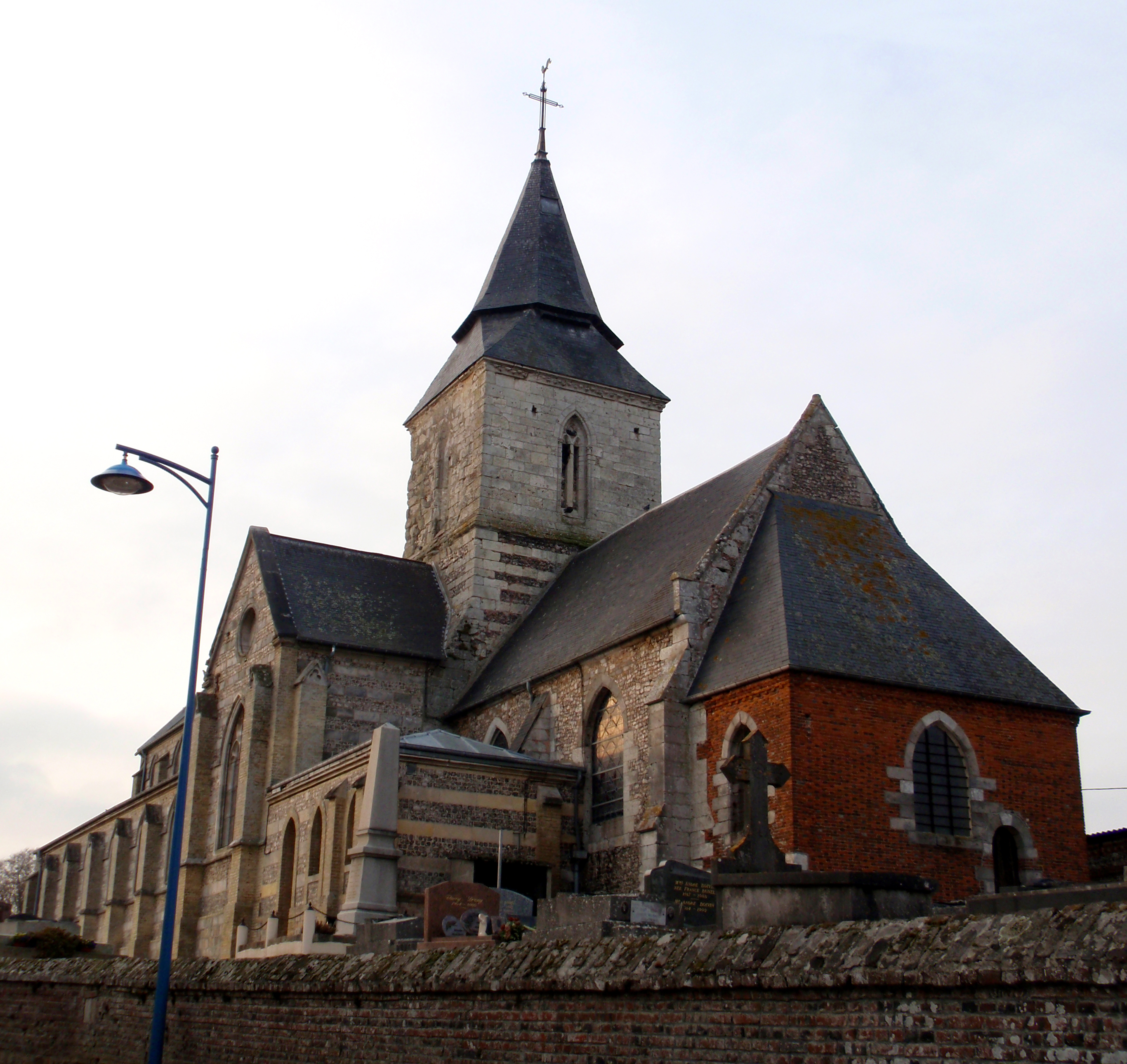 Hautot-l'Auvray (Seine-Maritime, France). L'église Saint-Martin.